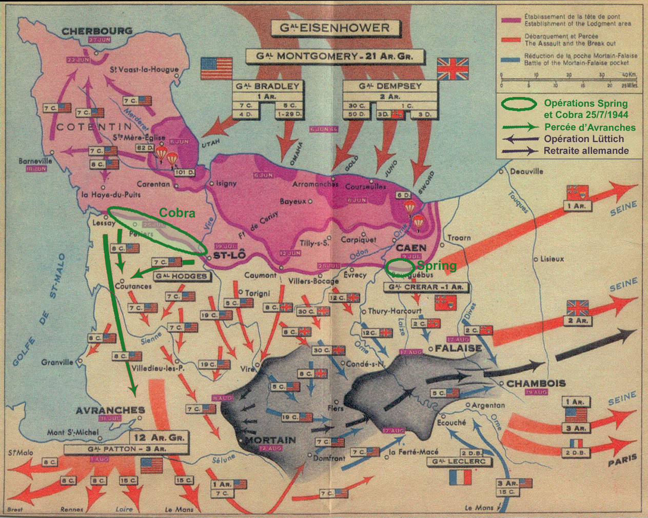 positionnement des opérations Spring et Cobra dans la Bataille de Normandie